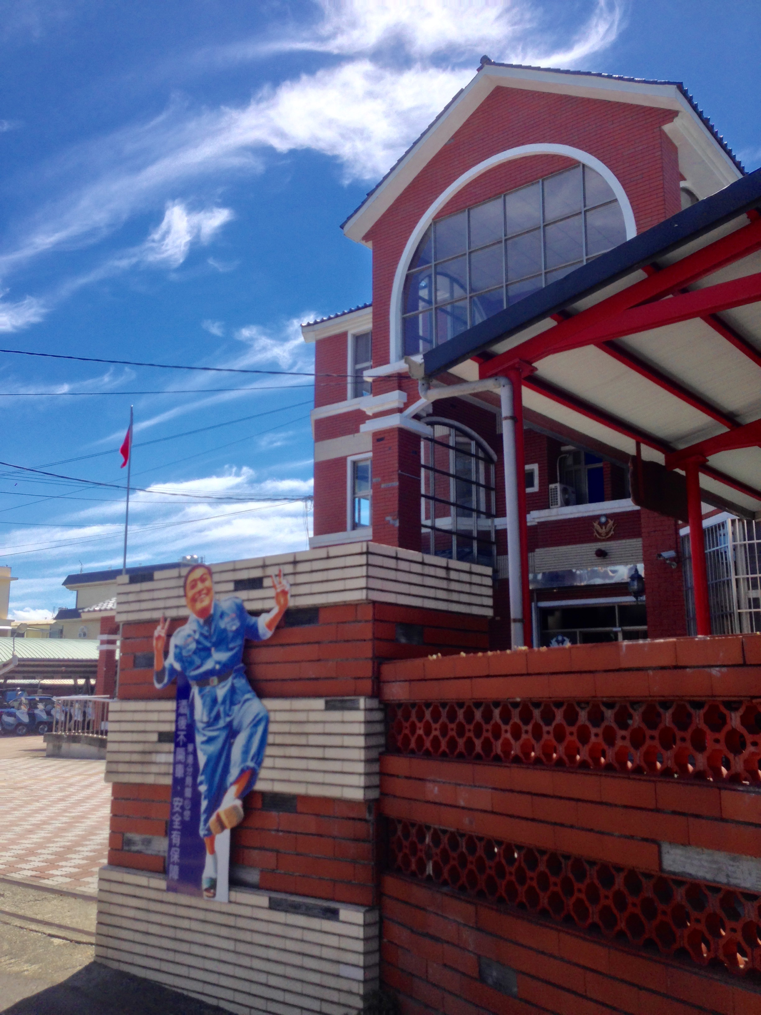 中文（台灣）: 屏東縣政府警察局東港分局興龍派出所，原名烏龍派出所，地址：屏東縣新園鄉興龍村南興路278號。大門右側設置與《烏龍派出所》兩津勘吉長相相似的本所警員cosplay兩津勘吉的人型看板，供遊客拍照留念。